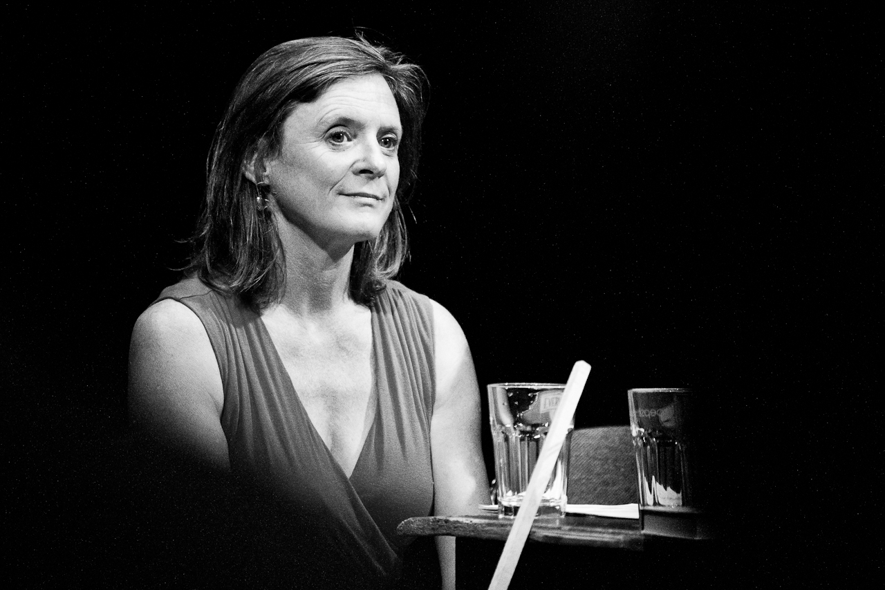 Měsíc autorského čtení 2014